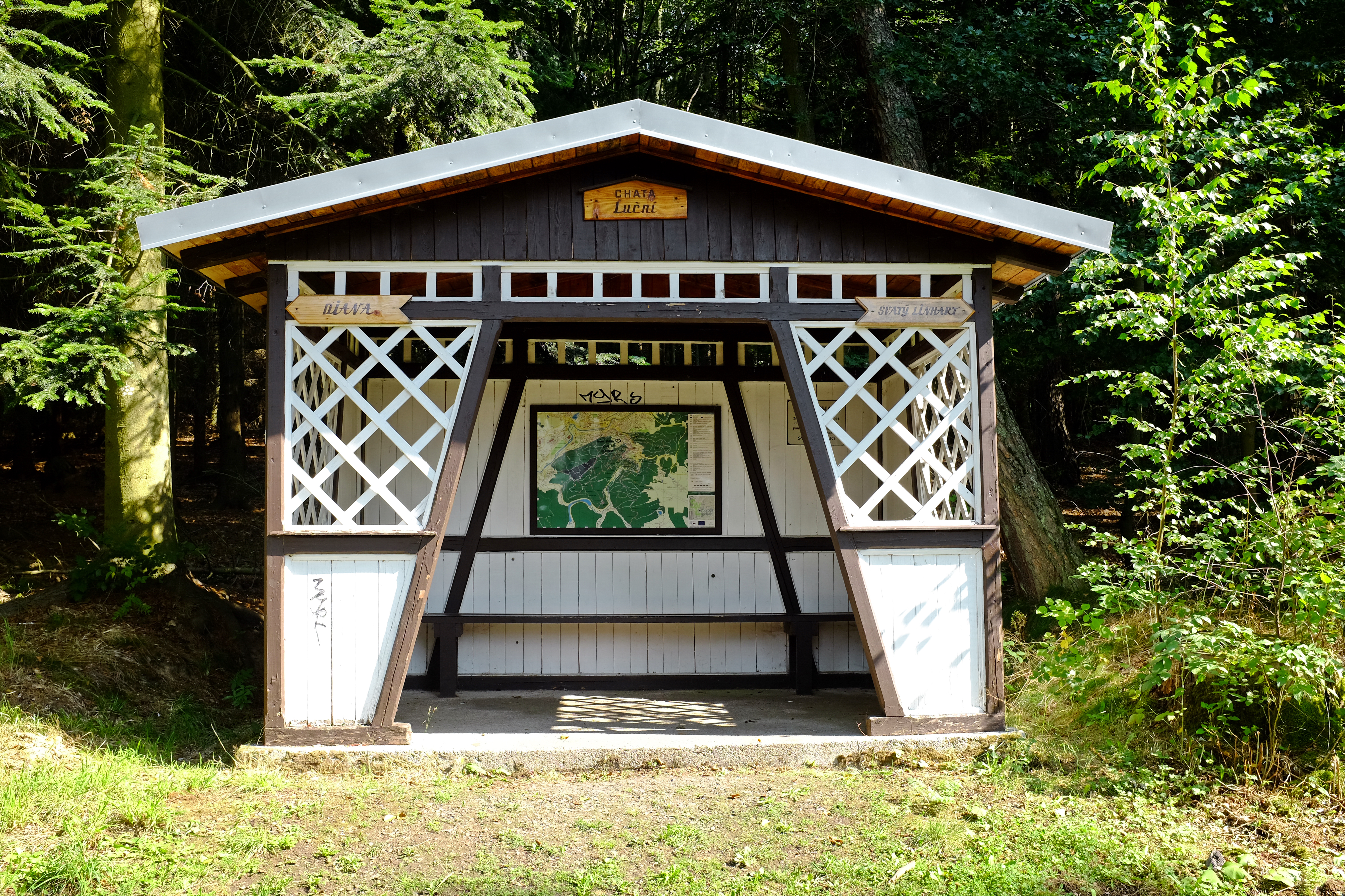 Karlovy Vary, lázeňské lesy, Luční chata